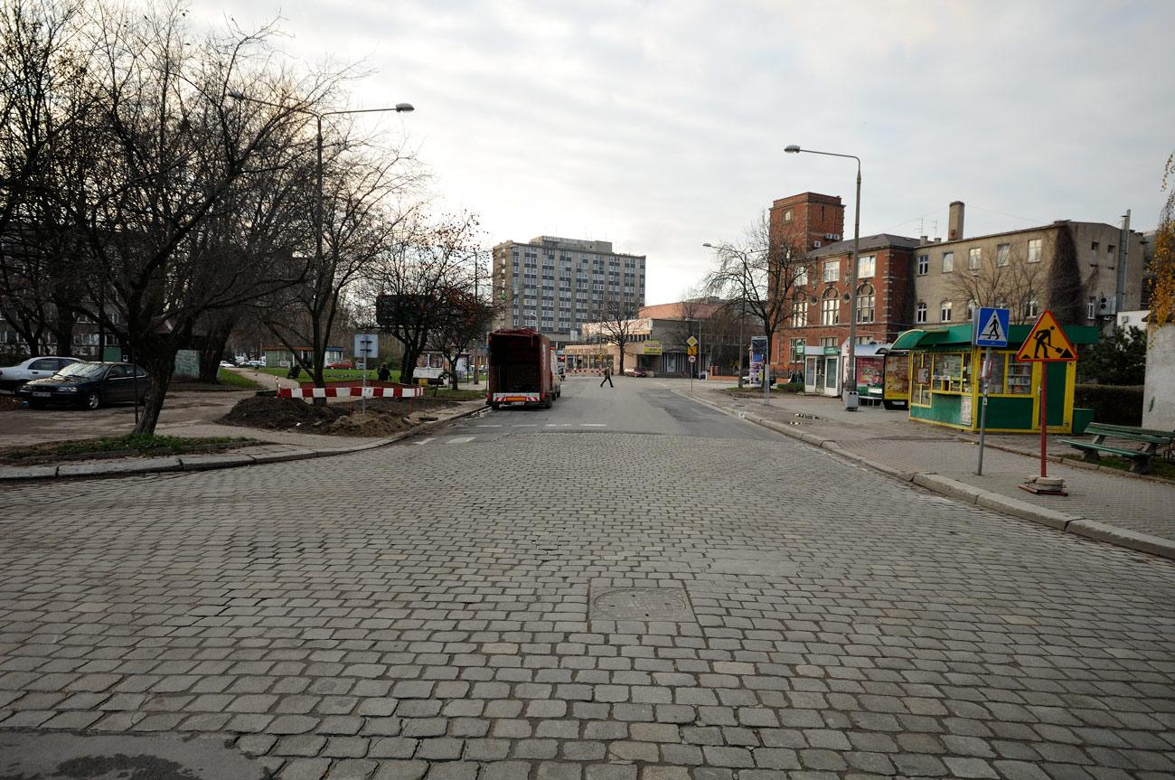 Ulica Wielka widziana od Gwiaździstej w stronę placu Hirszfelda.